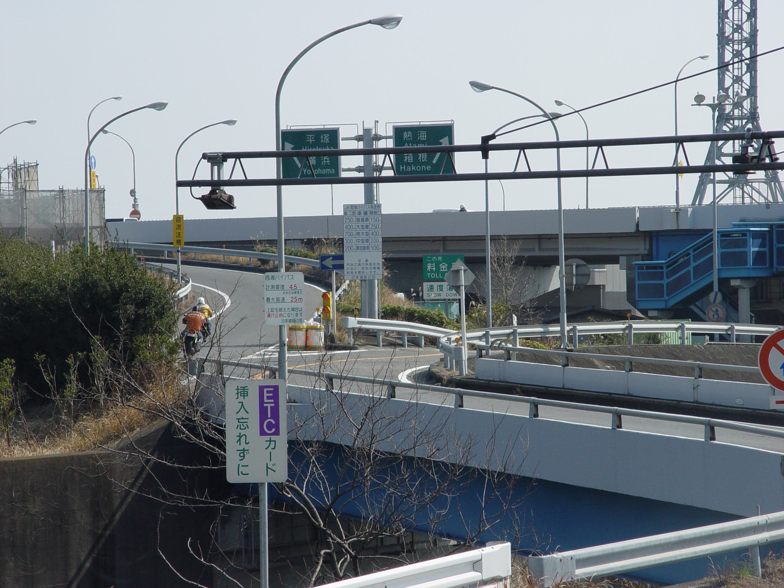 Kozu Interchange, Seisho by-pass 西湘バイパス国府津インターチェンジ